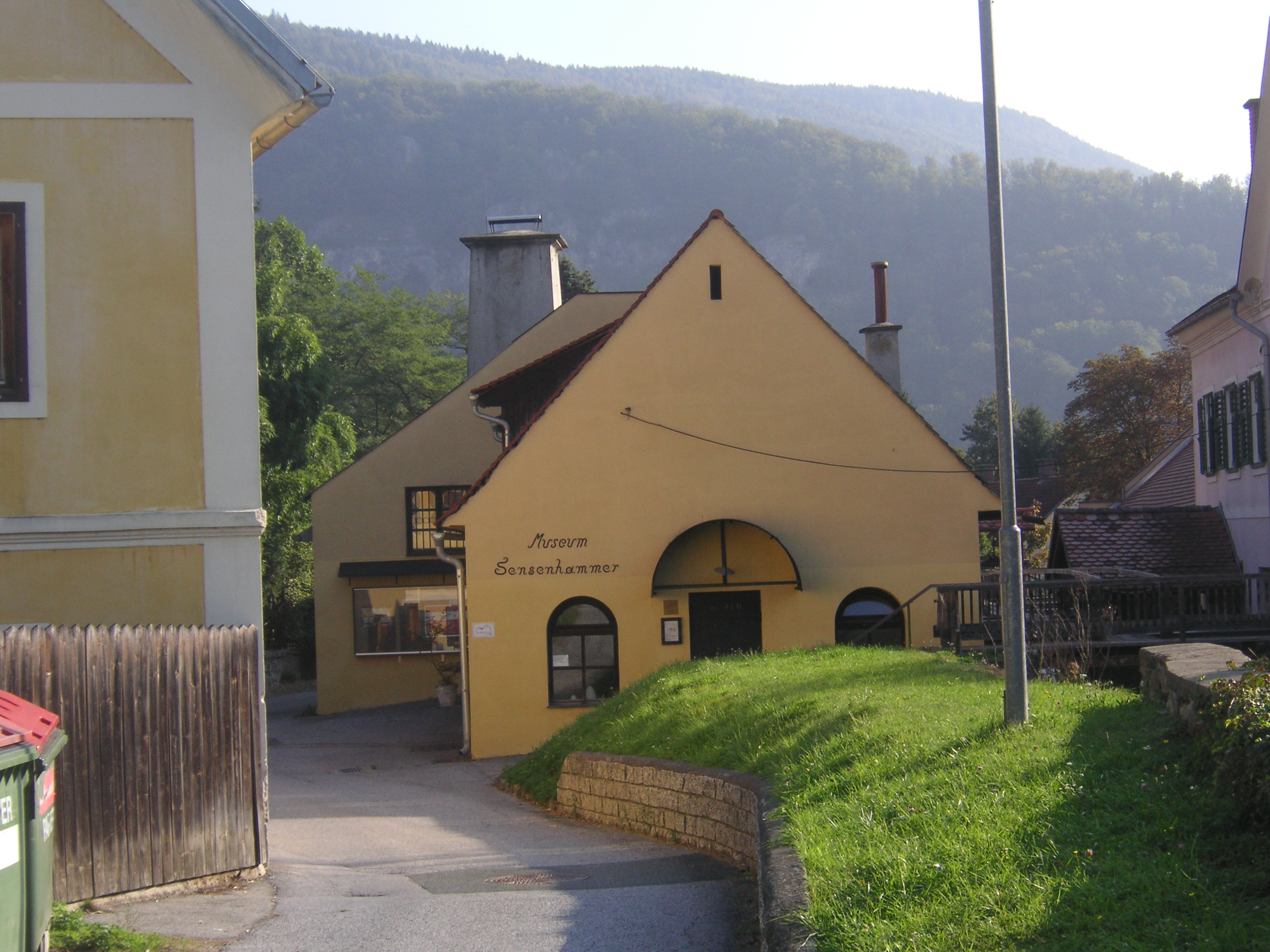 Das ehem. Sensenwerk in Deutschfeistritz